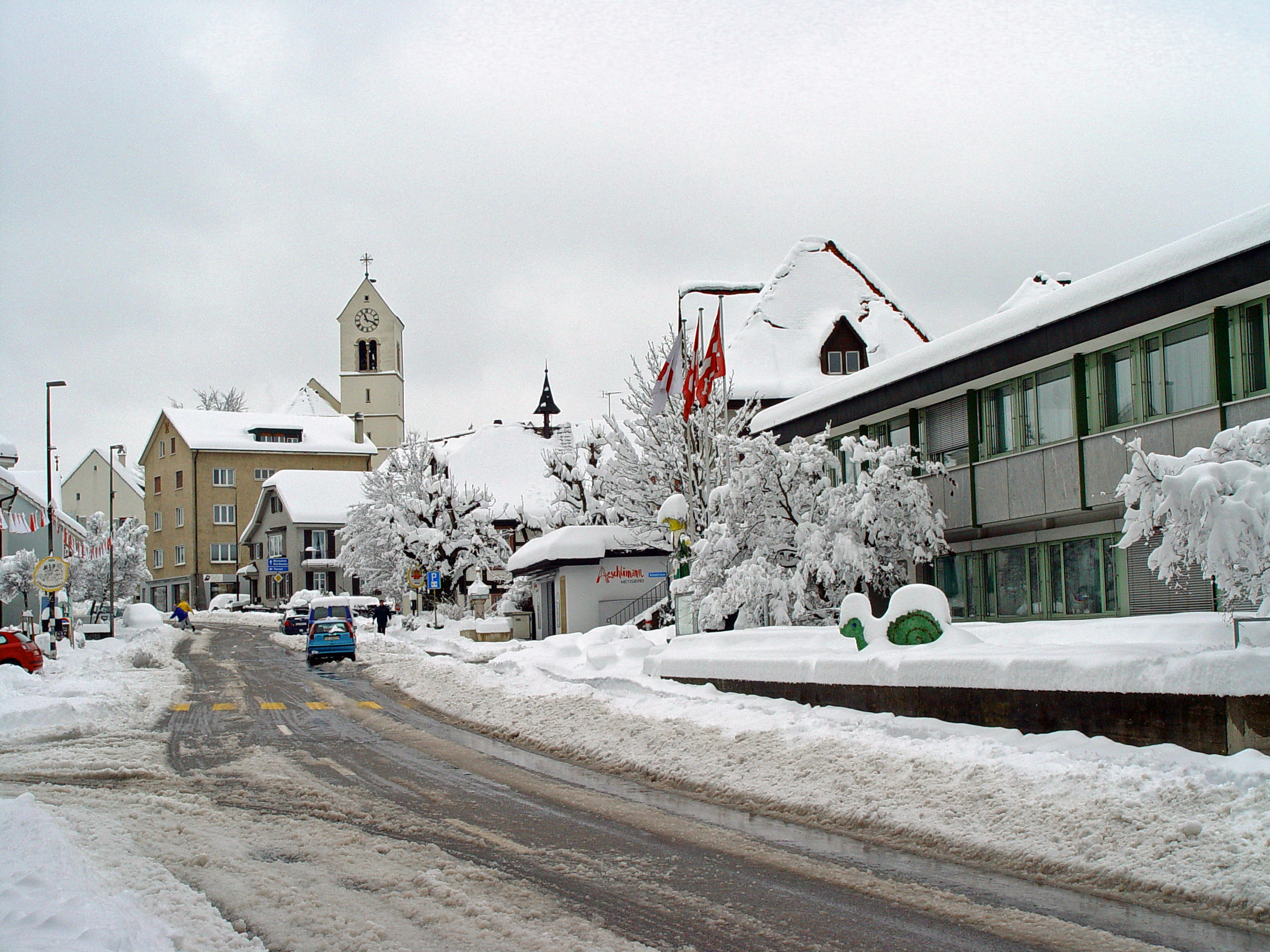 Im März 2006 kam unerwartet Schnee in vielen Ortschaften von Baselland. So schneebedeckt ist Oberwil nur selten zu sehen.